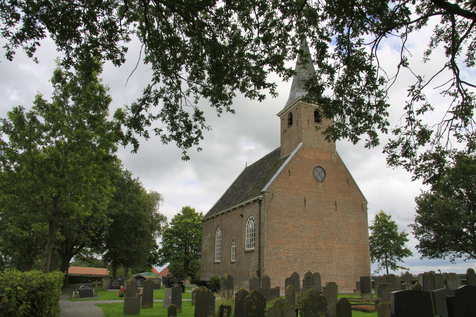 De Hervormde kerk De Kapelle uit 1818 in Haskerdijken.